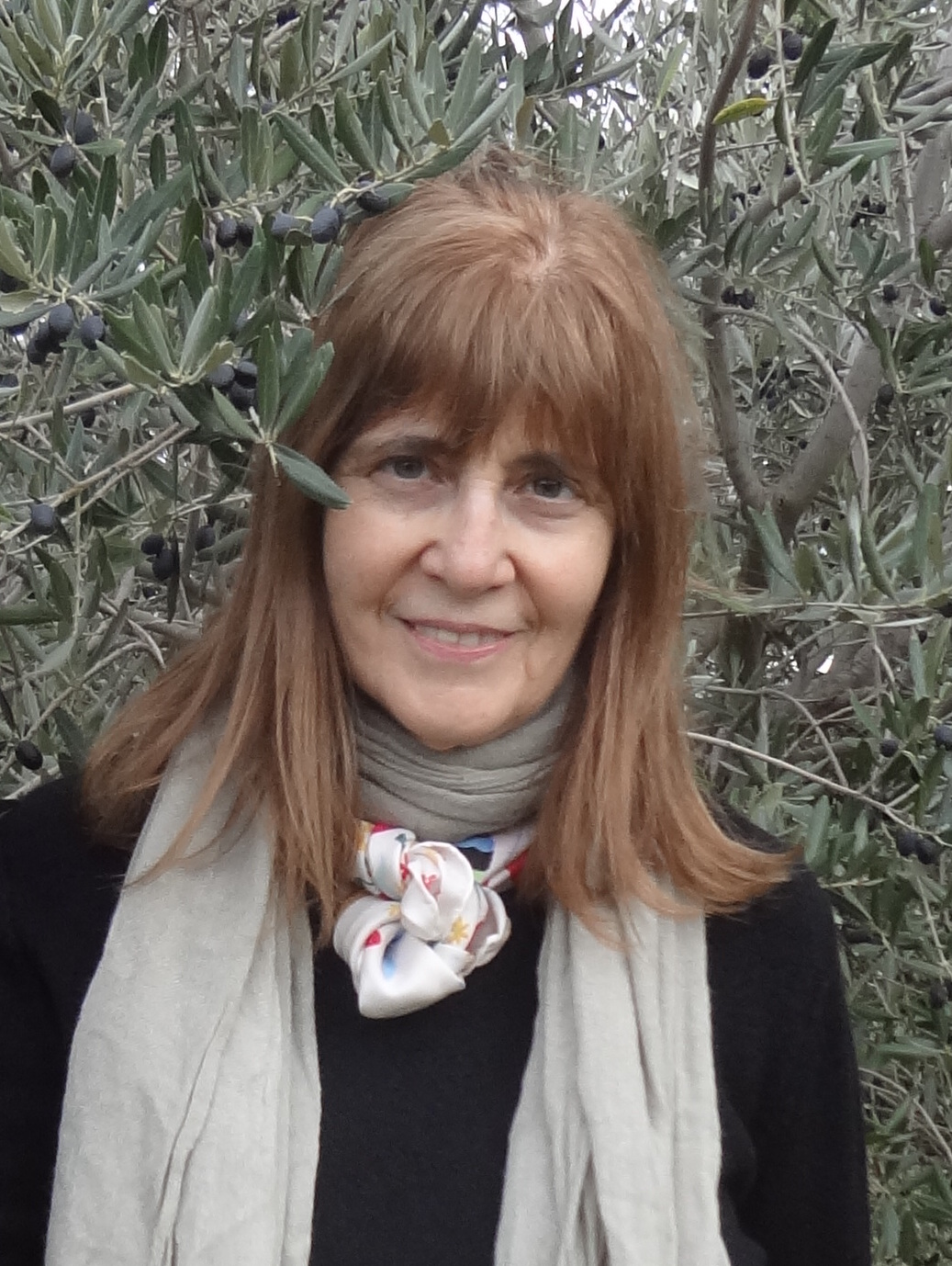 La escritora en el atelier de Cézanne en Enero de 2014